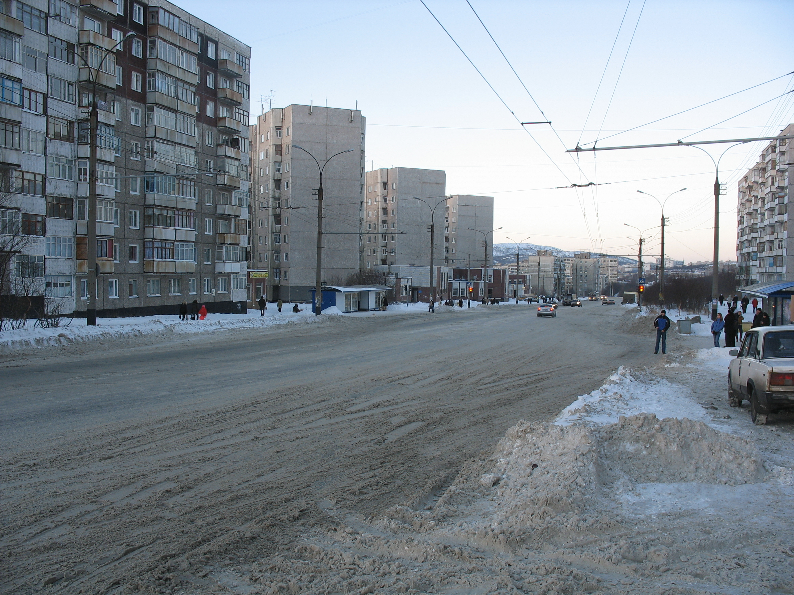 Мурманск. Улица Героев Рыбачьего